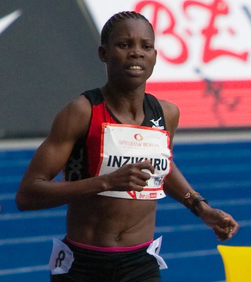 ISTAF Berlin 2012, 3000m Hindernislauf: Docus Inzikuru